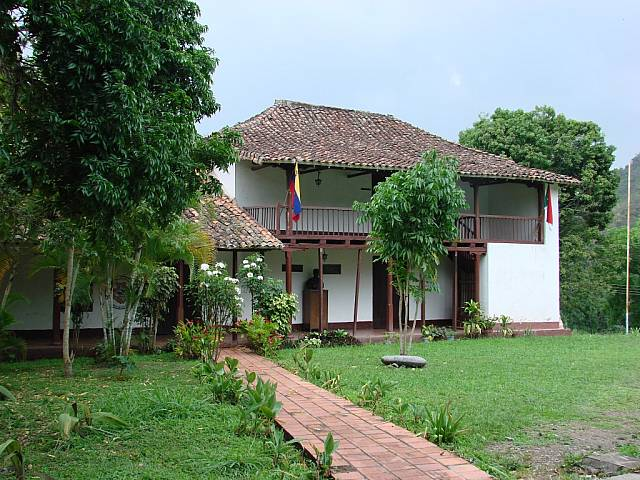 House Carmania